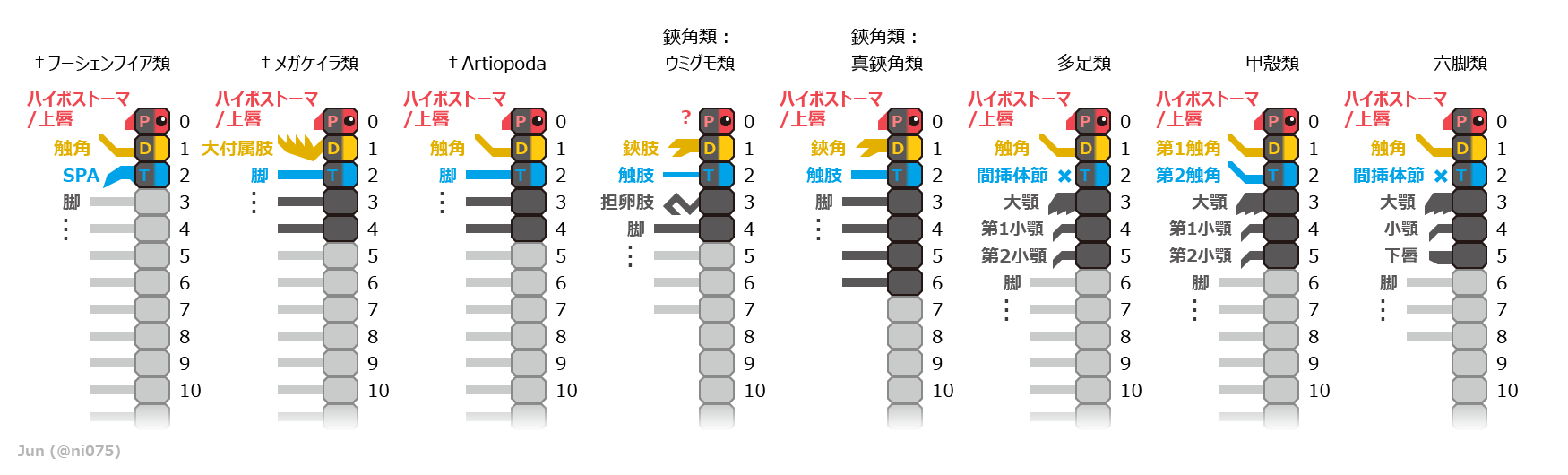 2017年現在で広く認められる見解に基づいた、様々な真節足動物（フキシャンフィア類、Megacheira類・Artiopoda類・鋏角類・多足類・甲殻類・六脚類）における前部の体節と付属肢の対応関係。 眼を備わった最前端の体節（先節、ocular somite）は「0」で示し、直後の10つの体節は図の示す通り。それ以降の節は省略される。 暗灰色：前端の合体節に含まれる体節（真鋏角類の「前体」および残りの群の「頭部」） 赤色/P：前大脳性の体節/付属肢 黄色/D：中大脳性の体節/付属肢 緑色/T：後大脳性の体節/付属肢 汎節足動物の版： 現生汎節足動物の版： 参考文献： Origin and evolution of the panarthropod head – A palaeobiological and developmental perspective (May 2017) Segmentation and tagmosis in Chelicerata (May 2017) English